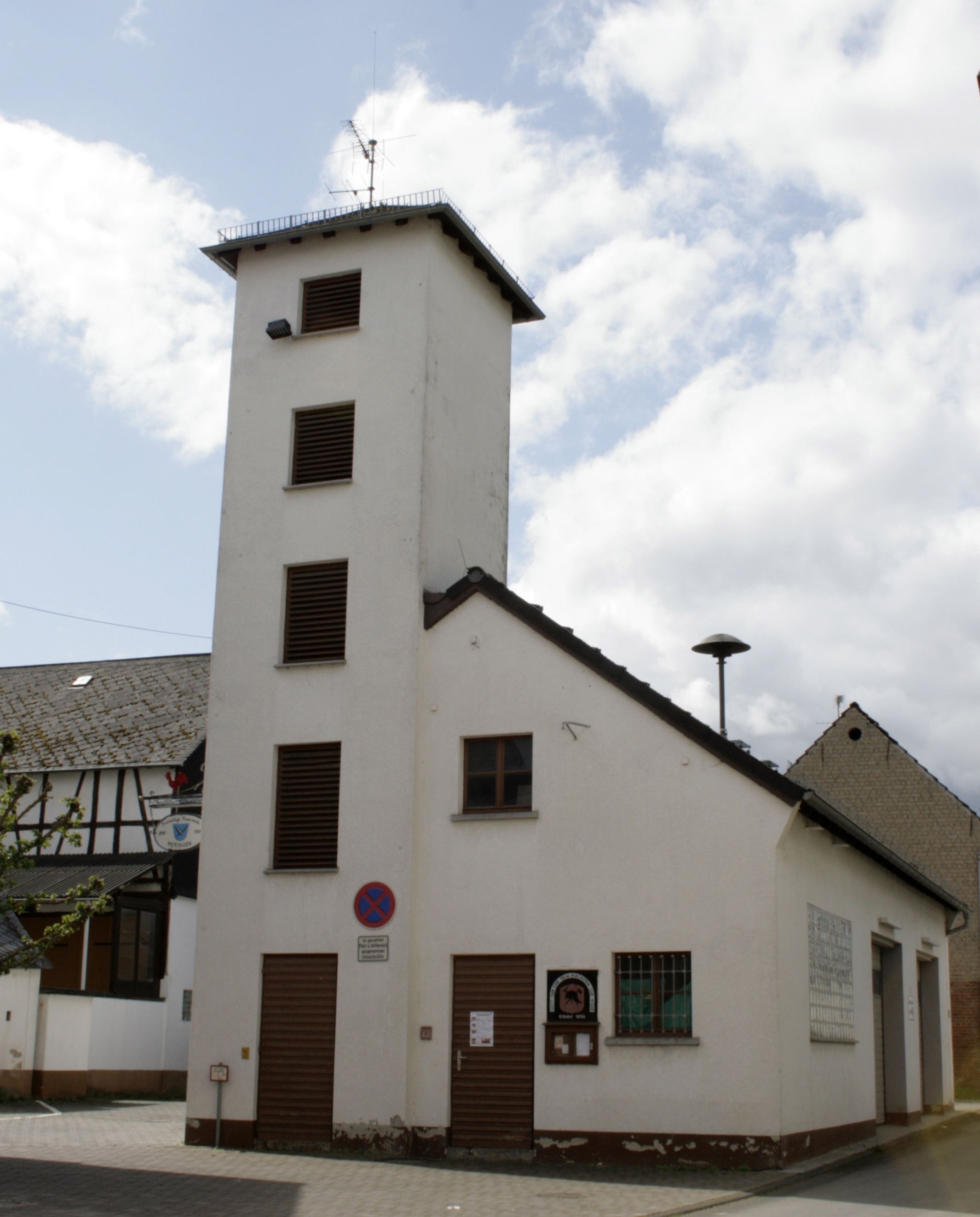 Feuerwehrhaus, Hünfelden-Heringen, Deutschland